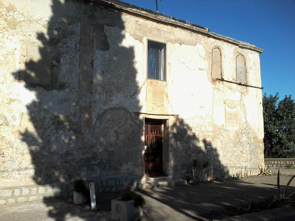 Santuario Mariano di Gibilrossa